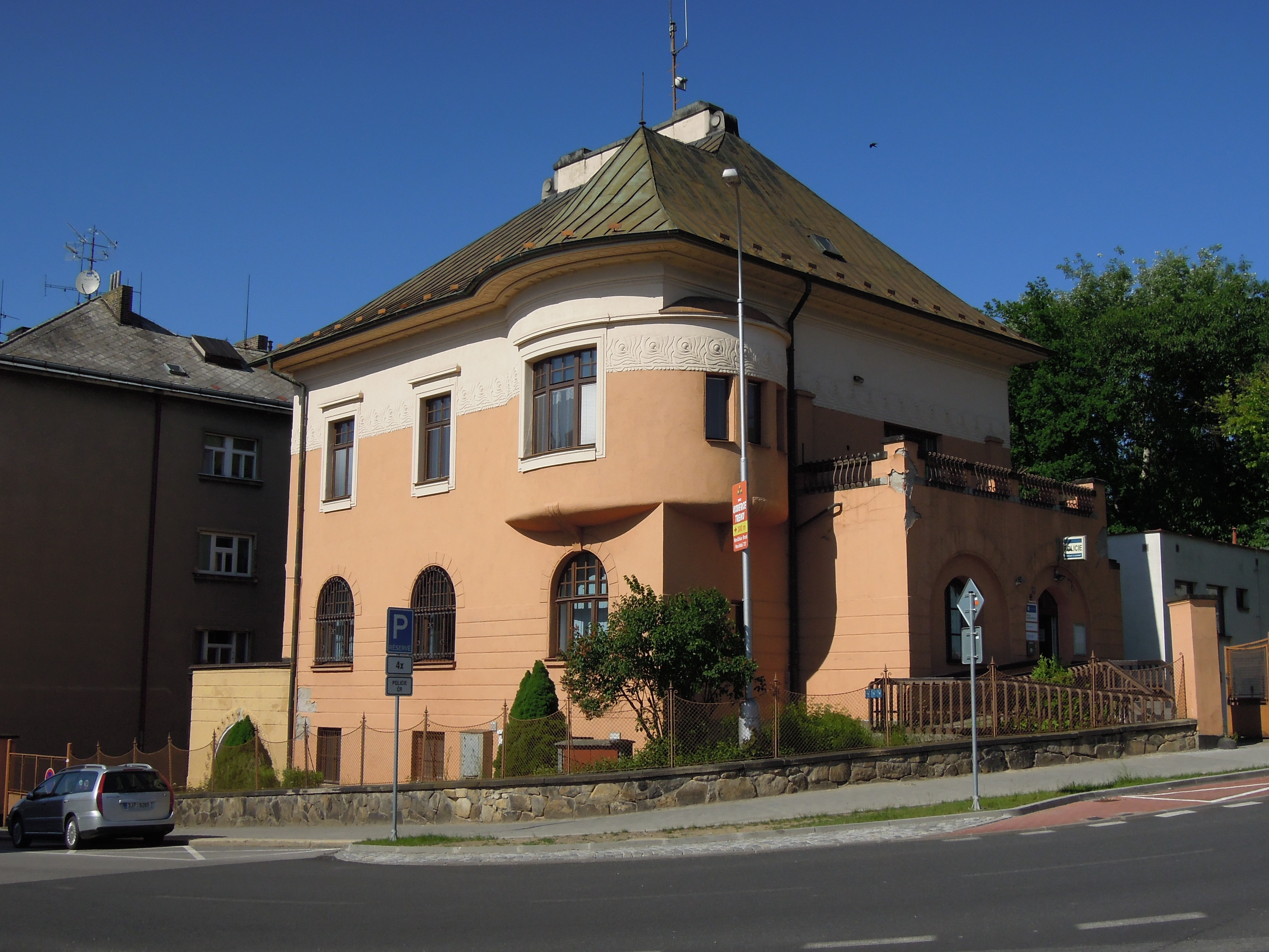 Policie ČR - Oddělení služby pro zbraně a bezpečnostní materiál Územního odboru Havlíčkův Brod Nádražní 59 580 01 Havlíčkův Brod Vysočina (Popisek souboru je chybný.)